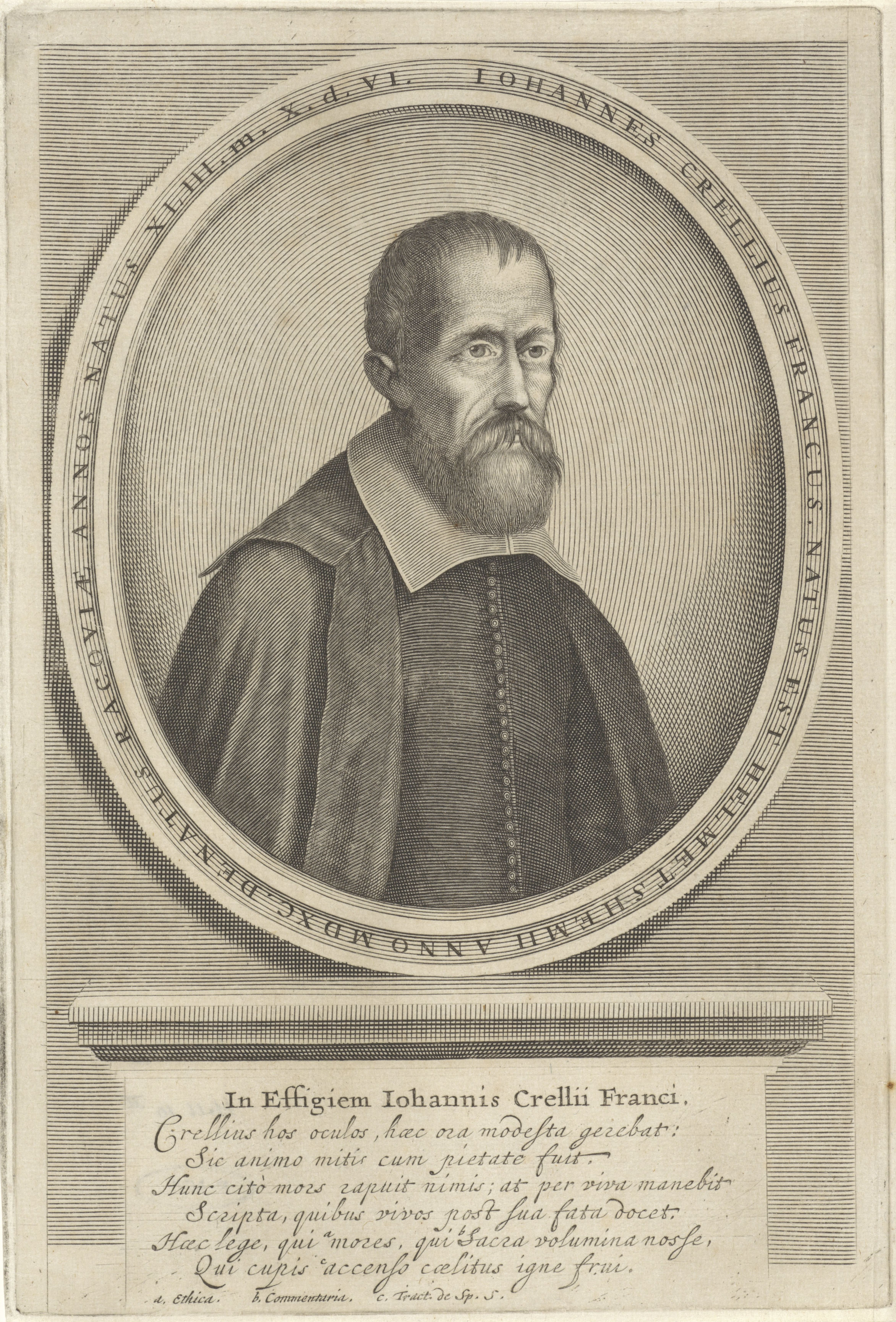 IdentificatieTitel(s): Portret van Johannes CrelliusObjecttype: prent Objectnummer: RP-P-OB-62.032Catalogusreferentie: Hollstein Dutch 10-2(2)Opschriften / Merken: verzamelaarsmerk, verso, gestempeld: Lugt 2228Omschrijving: Johannes Crellius op 43-jarige leeftijd. Hij draagt een korte baard en snor en is gekleed in een toga. Op de stenen sokkel Waar: op het portret rust zijn naam en een lofdicht in Latijn.VervaardigingVervaardiger: prentmaker: Lambert Visscher (toegeschreven aan)Datering: 1643 - 1691Fysieke kenmerken: gravureMateriaal: papier Techniek: graveren (drukprocedé)Afmetingen: plaatrand: h 227 mm × b 152 mmOnderwerpWat: beardWie: Johannes CrelliusVerwerving en rechtenVerwerving: onbekendCopyright: Publiek domein